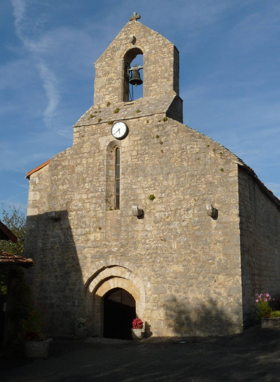 église de St-Sulpice-de-Ruffec, Charente, France